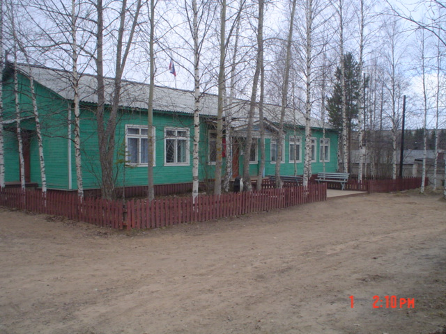 Здание администрации МО "Луковецкое" в посёлке Луковецкий.